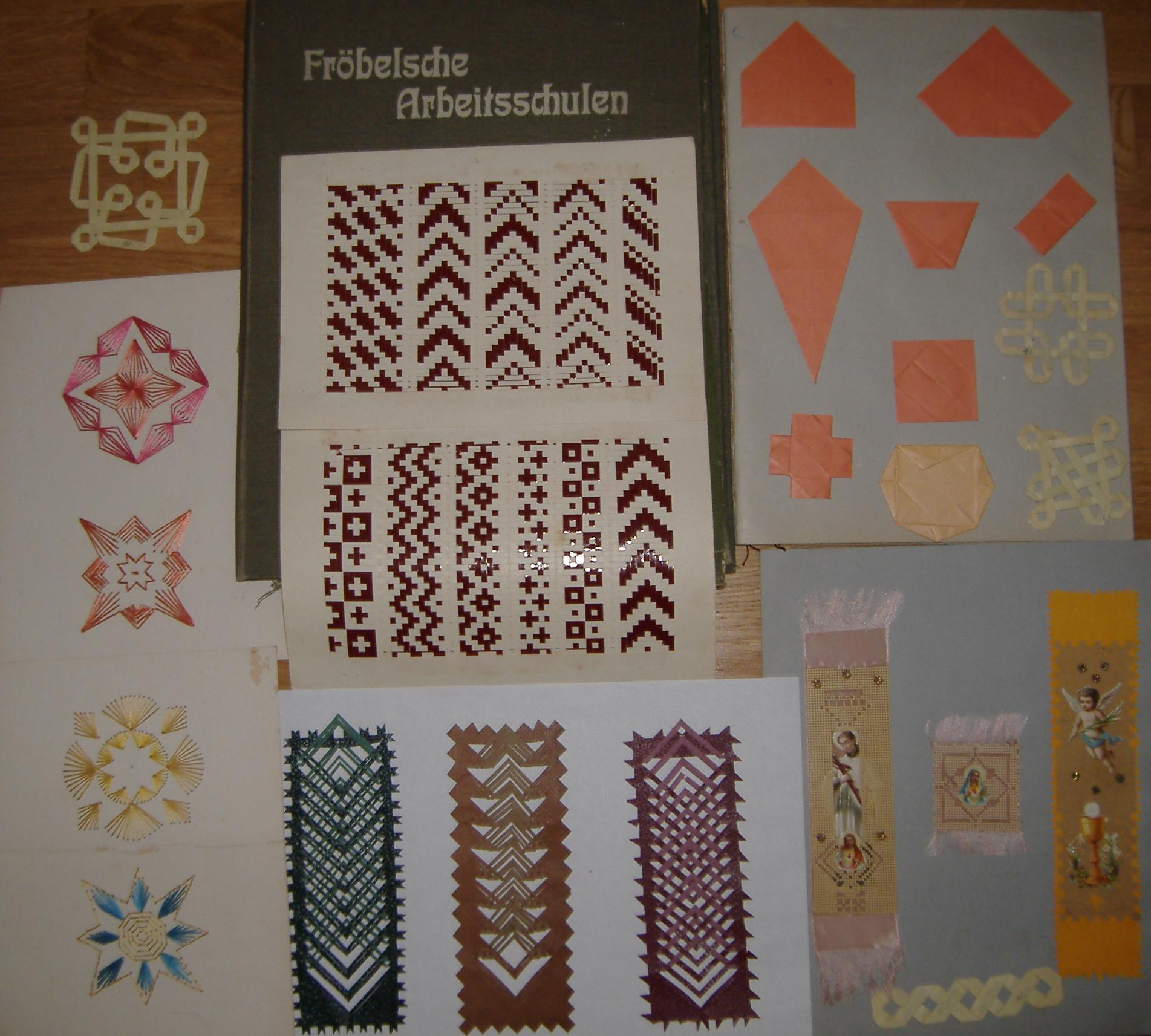 Fröbelmappe Schuljahr 1913 Fachakademie für Sozialpädagogik Dillingen